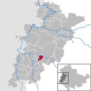 Leimbach in Thuringia - Wartburgkreis